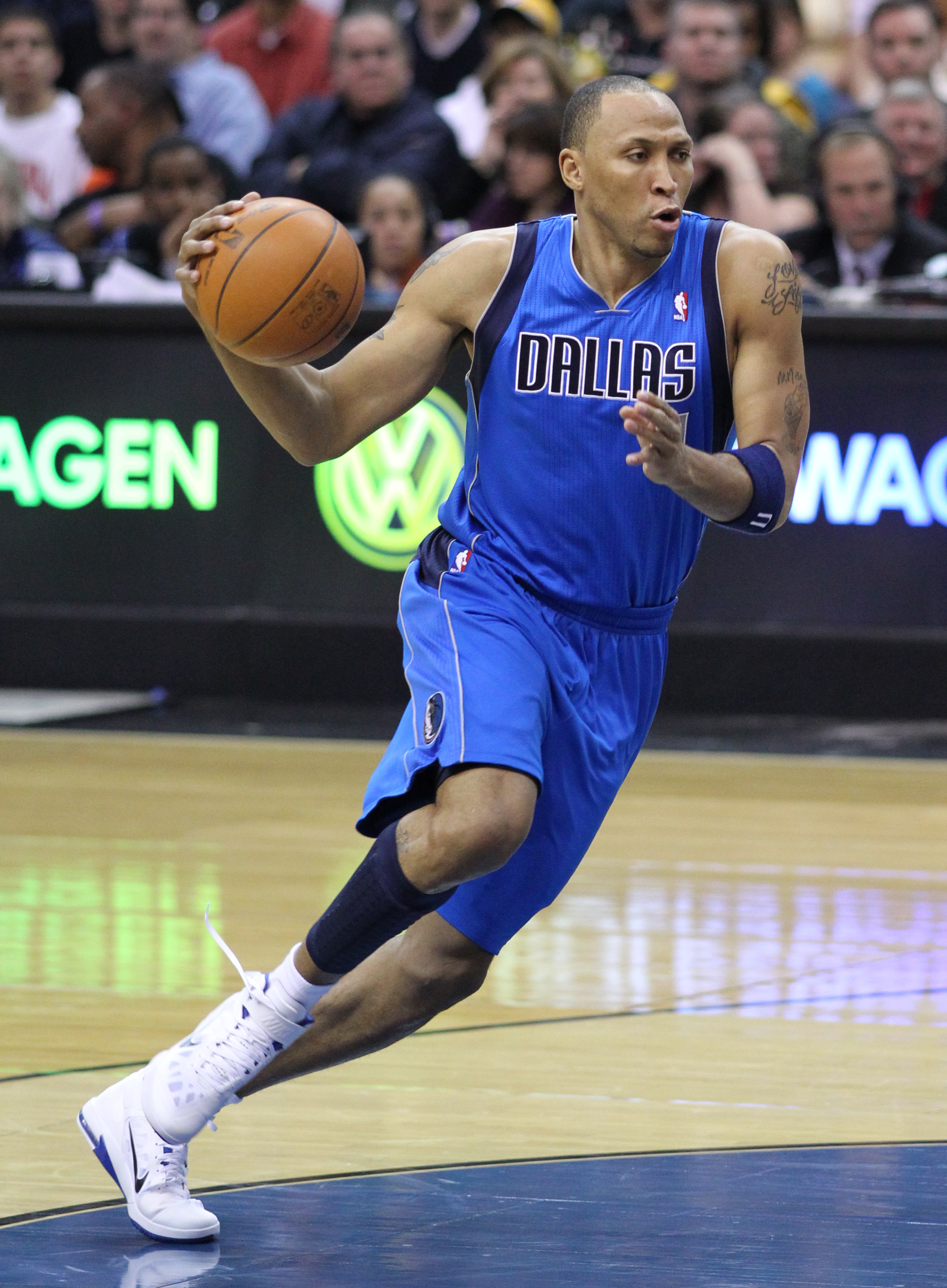 Wizards v/s Mavericks 02/26/11